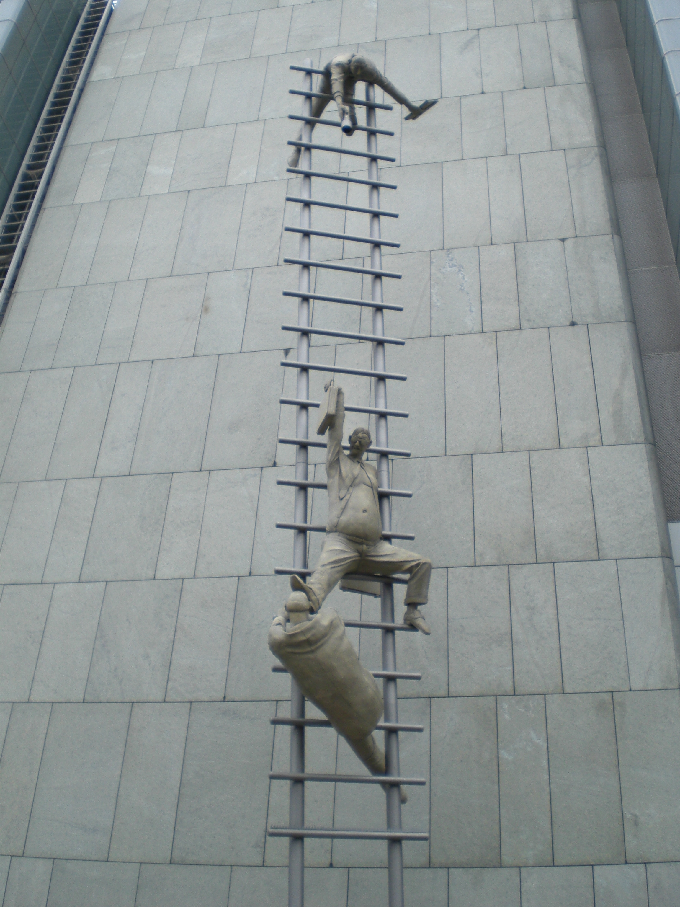 Kampf auf der Karriereleiter: Plastik von Peter Lenk an der Invesitionsbank, Bundesallee 210, Berlin siehe [1]